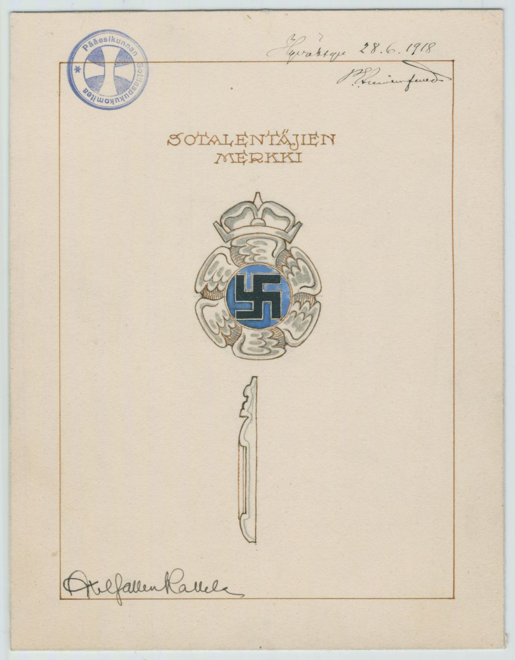 Sotalentäjien merkki